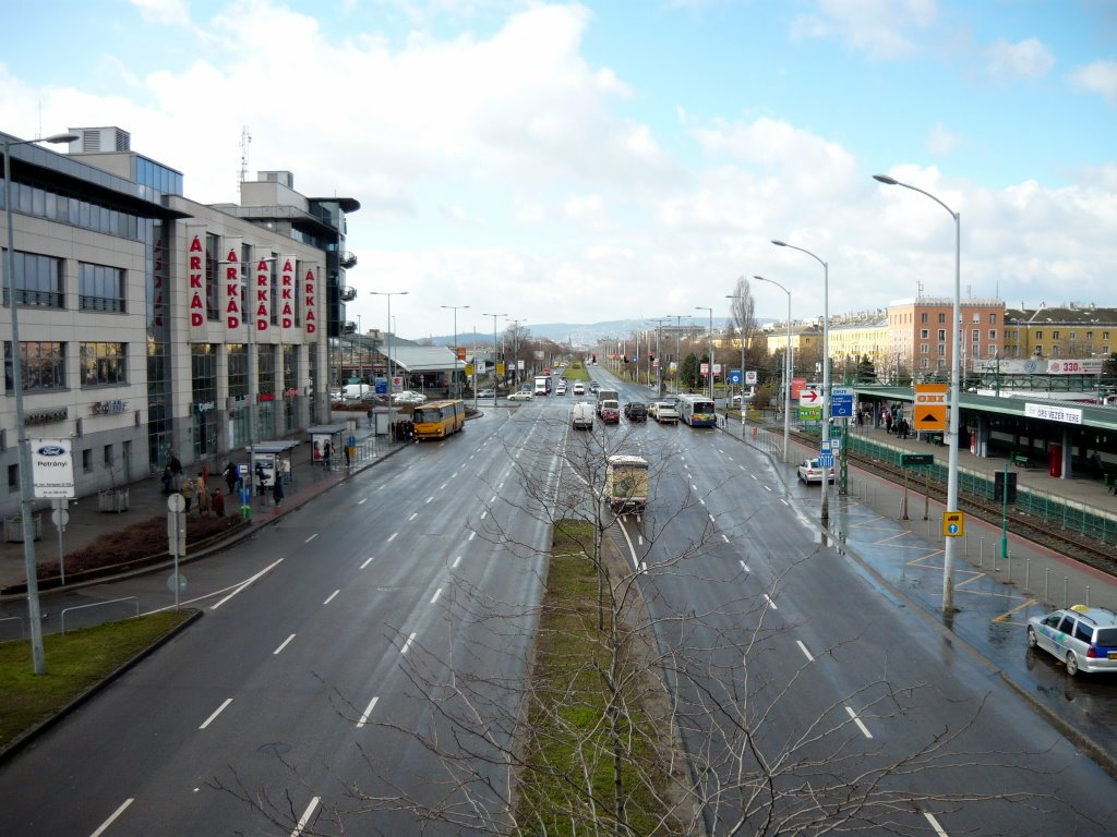 Örs vezér tere, Budapest (Kerepesi út a belváros felé, jobbra a Gödöllői HÉV végállomása, balra az Árkád)